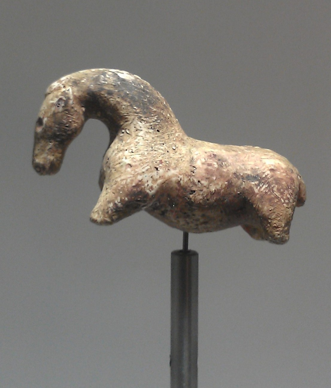 Parque de la Prehistoria de Teverga, Asturias (España). Caballo. Vogelherd (Baden-Württenberg. Alemania) Estatuilla esculpida en marfil de mamut. Réplica del original de la Universität Tübingen